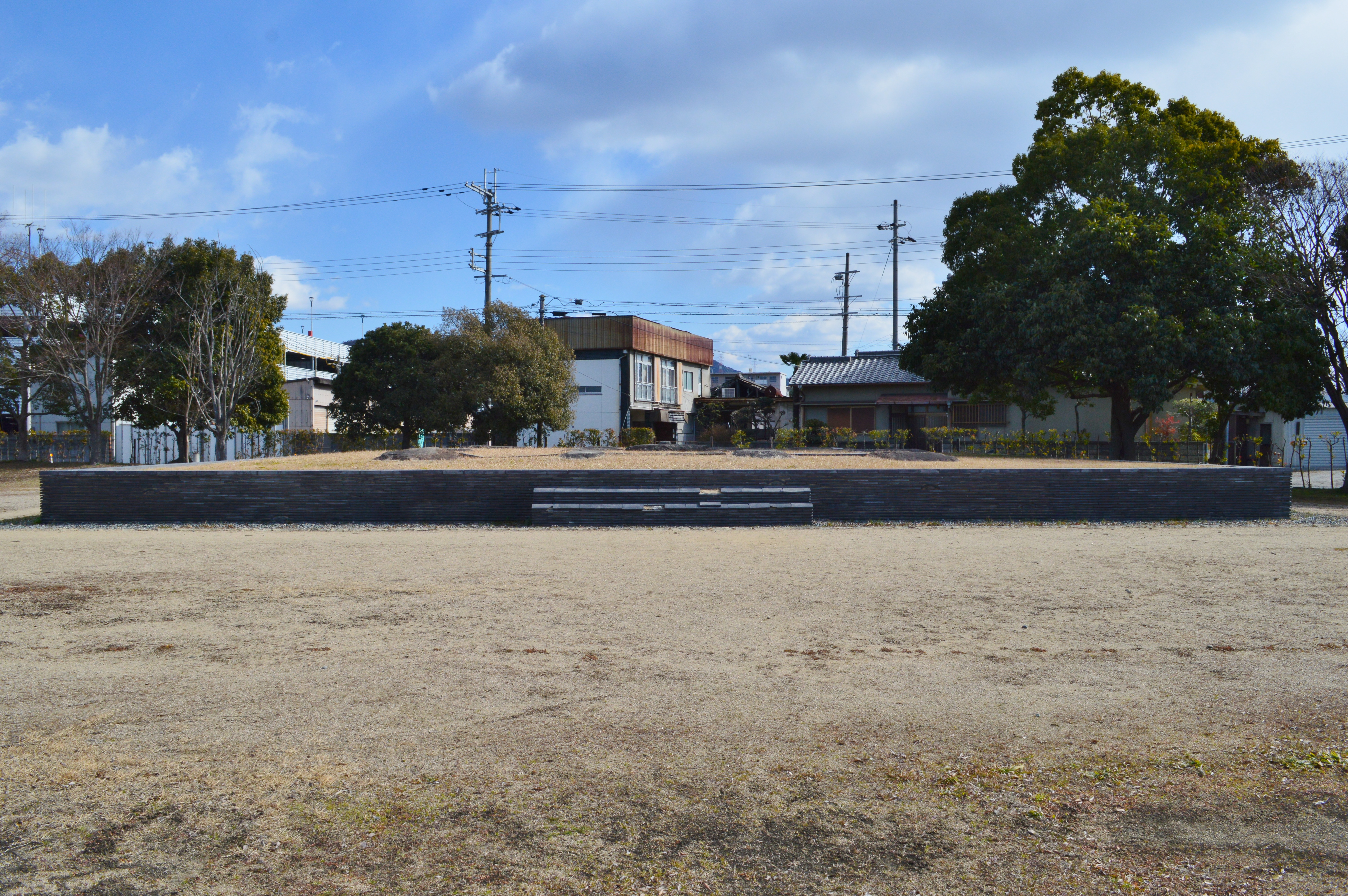 播磨国分寺跡 塔基壇